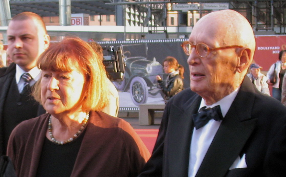 Marlies und Wolfgang Menge in Berlin bei der Eröffnung von Boulevard der Stars